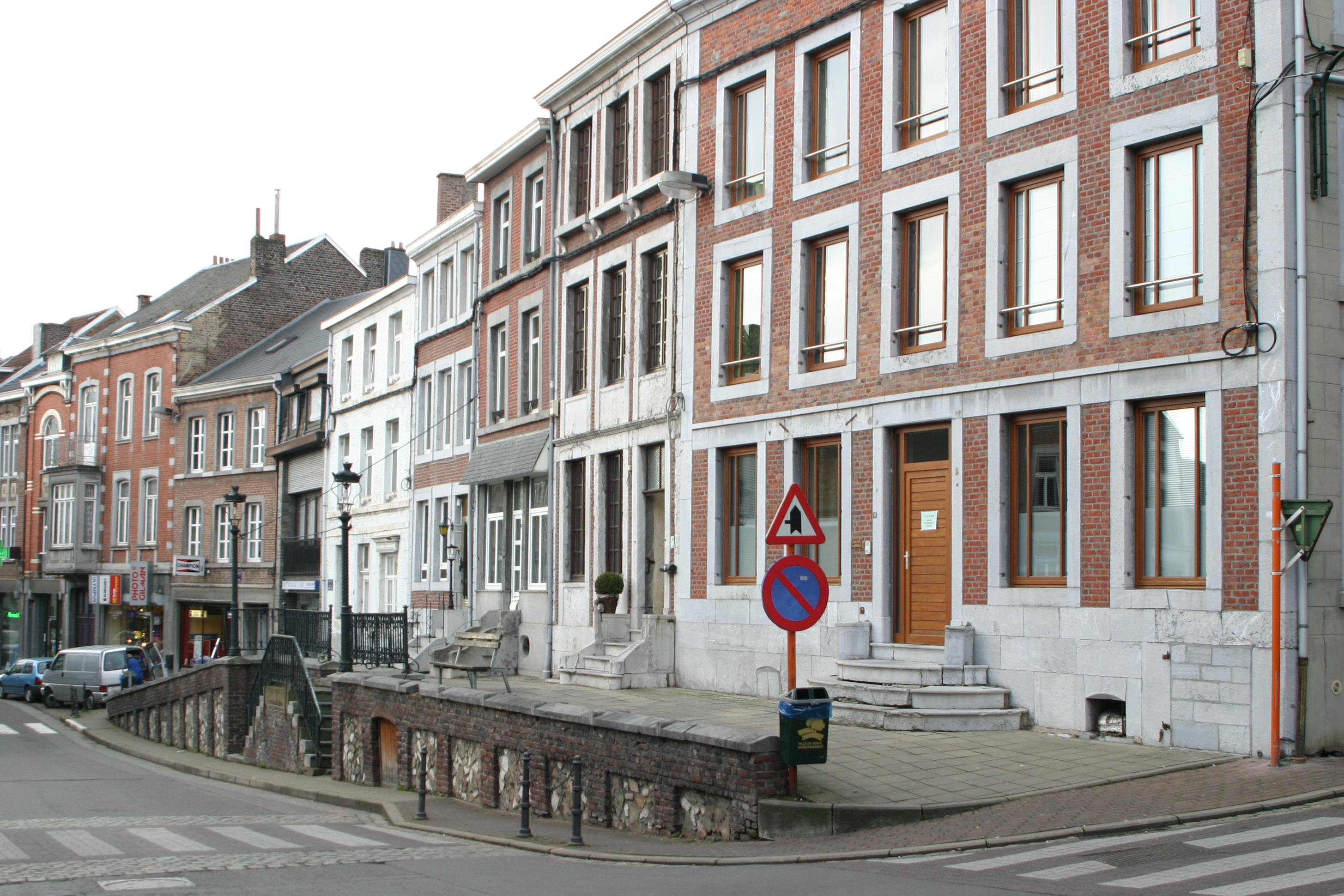 Haiser mat Perron an der Pottiérue zu Herve.